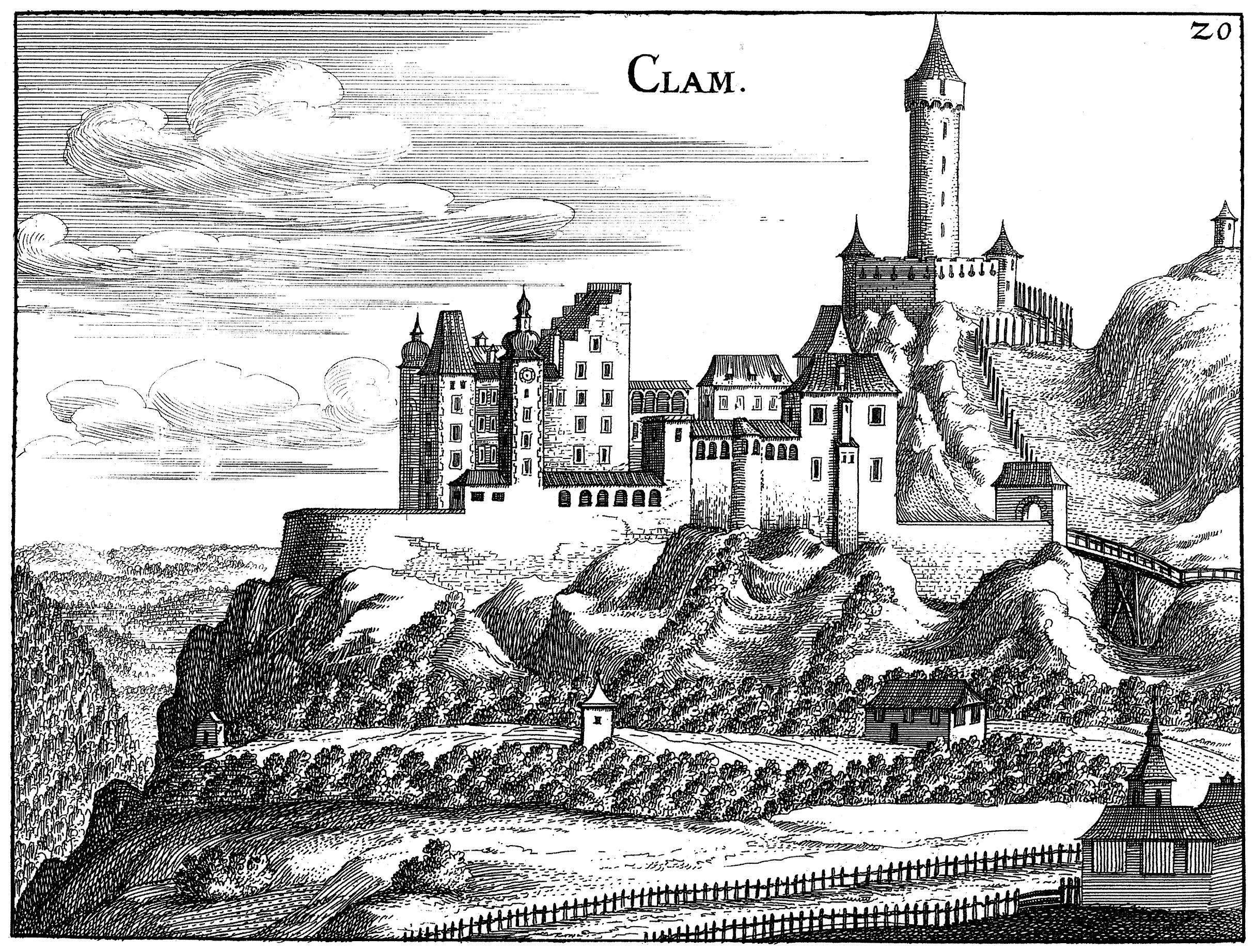 Ansicht der Burg Clam in der Topographia Austriae superioris modernae